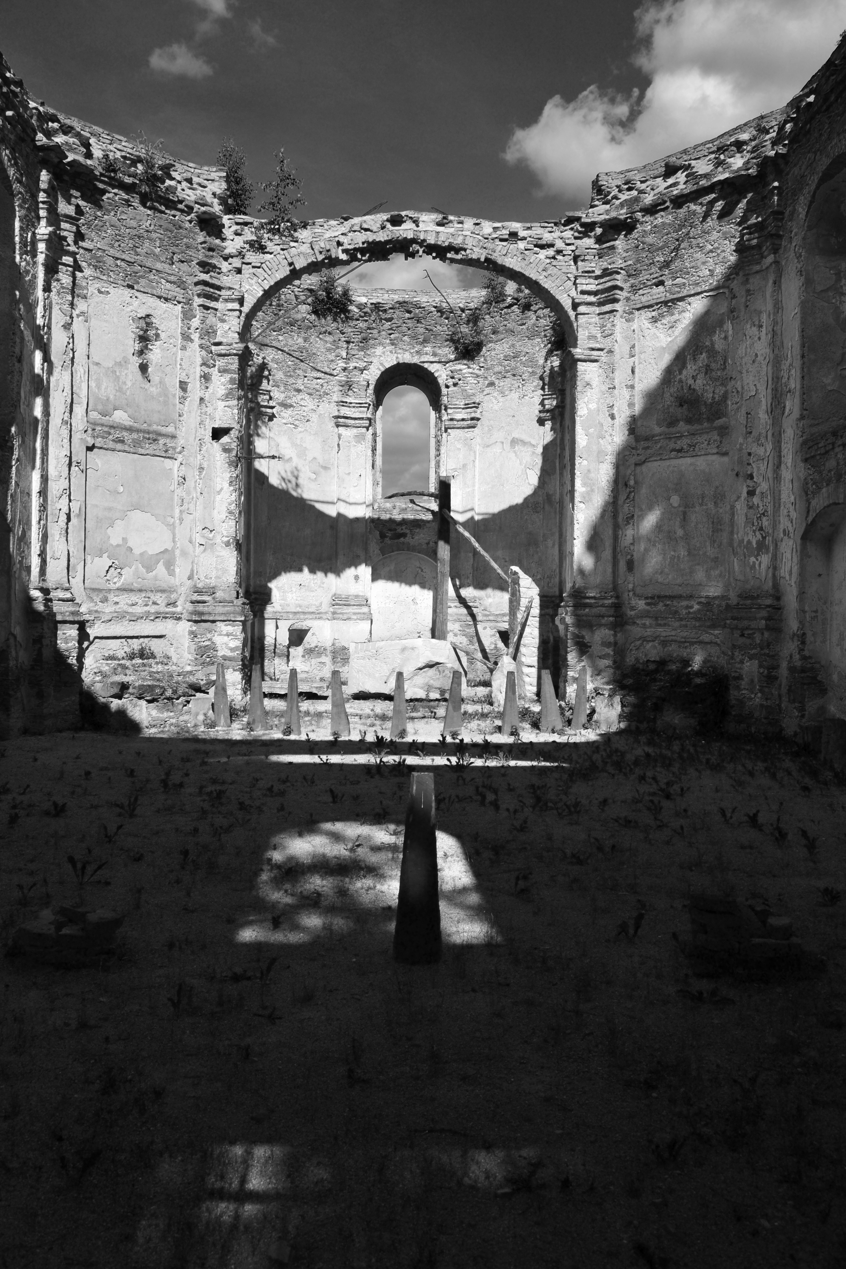 Kostel sv. Blažeje (Branišov), při Blažejovském rybníce, Branišov